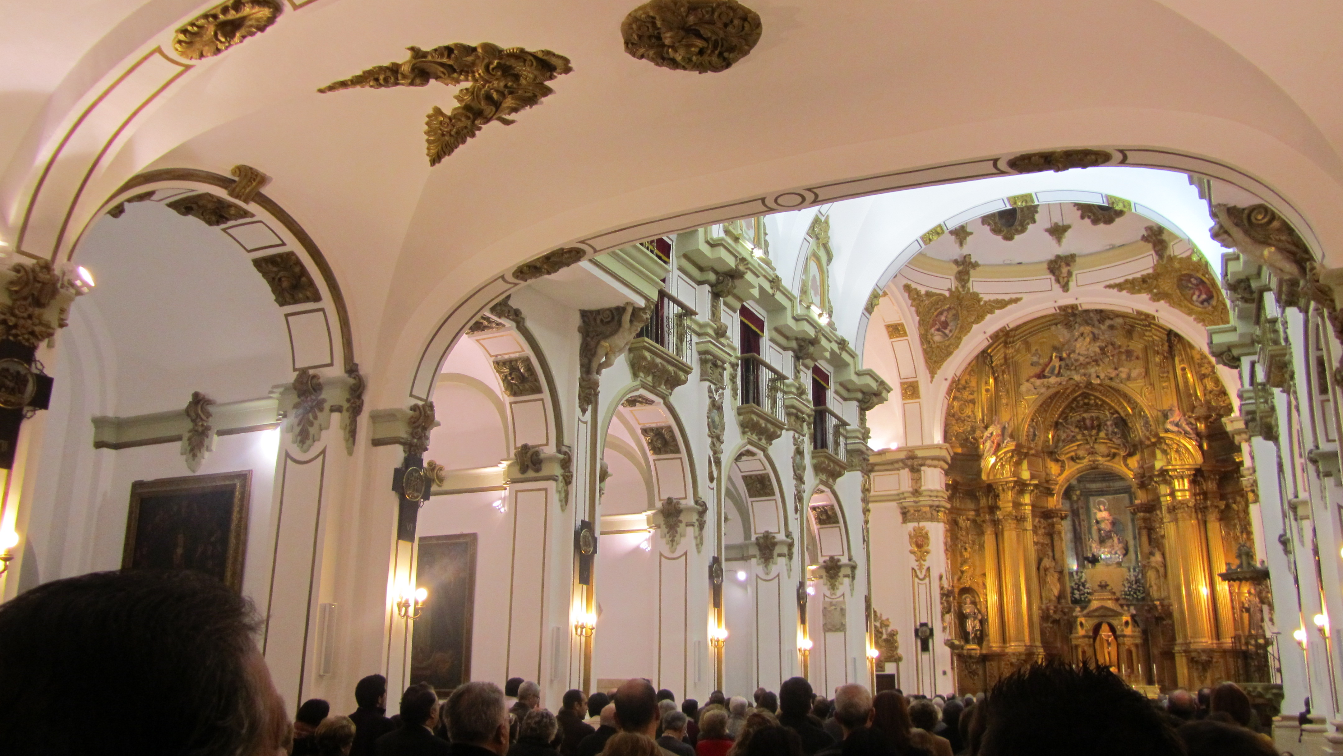 Interior de la Iglesia Conventual de La Merced de Murcia (España). De estilo barroco de principios del siglo XVIII. El retablo mayor es de mediados de la misma centuria.